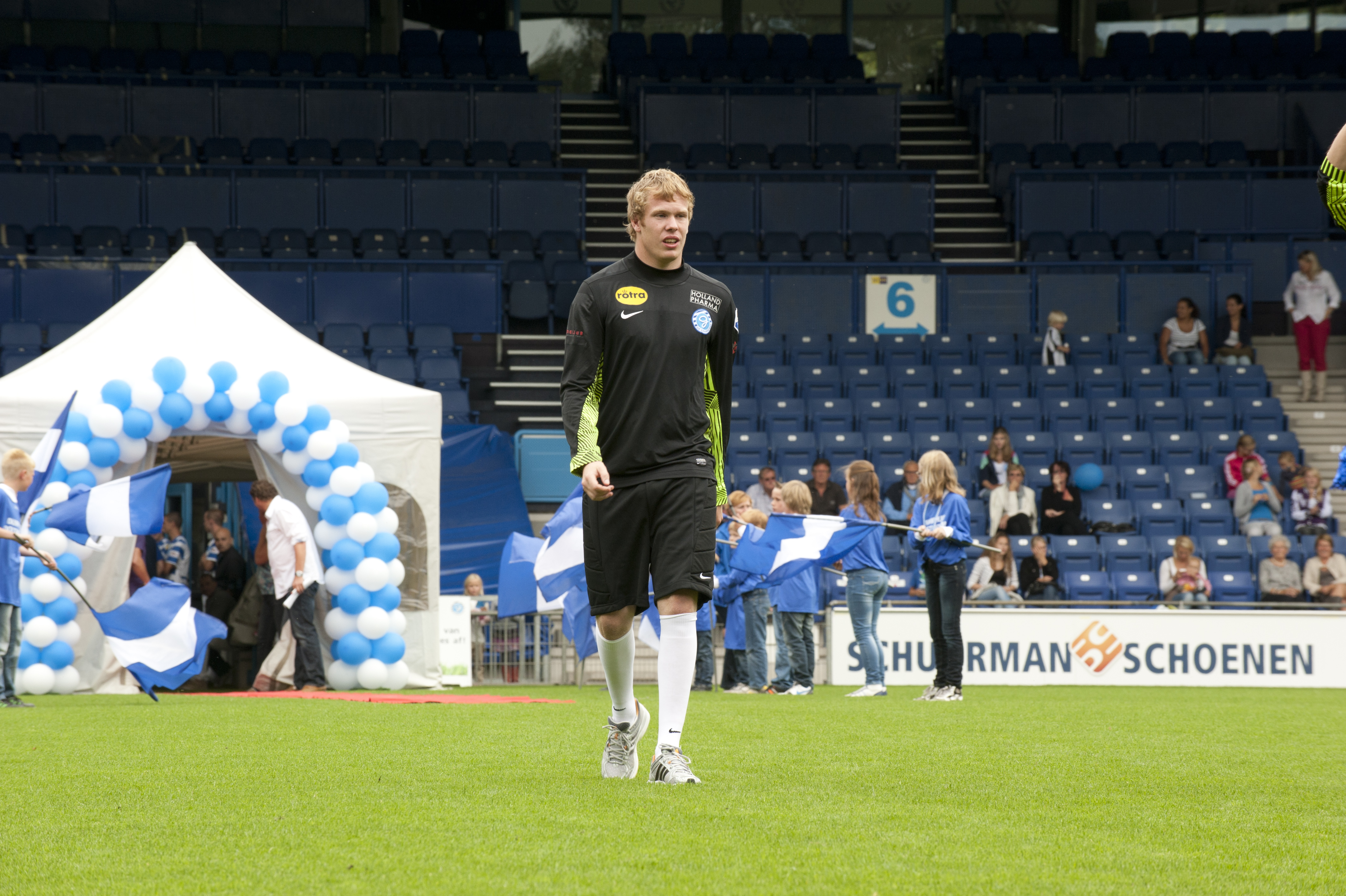 Jordy van de Kracht op de open dag van De Graafschap in 2011.